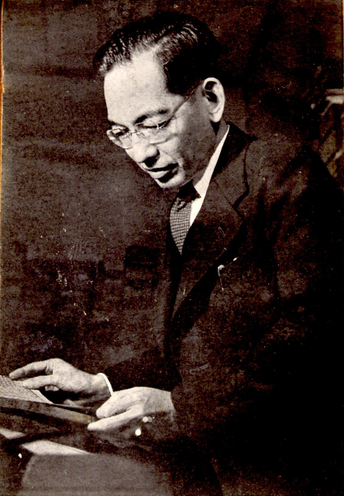 吉川幸次郎『中国への郷愁』（1956年3月21日刊行）に掲載された。